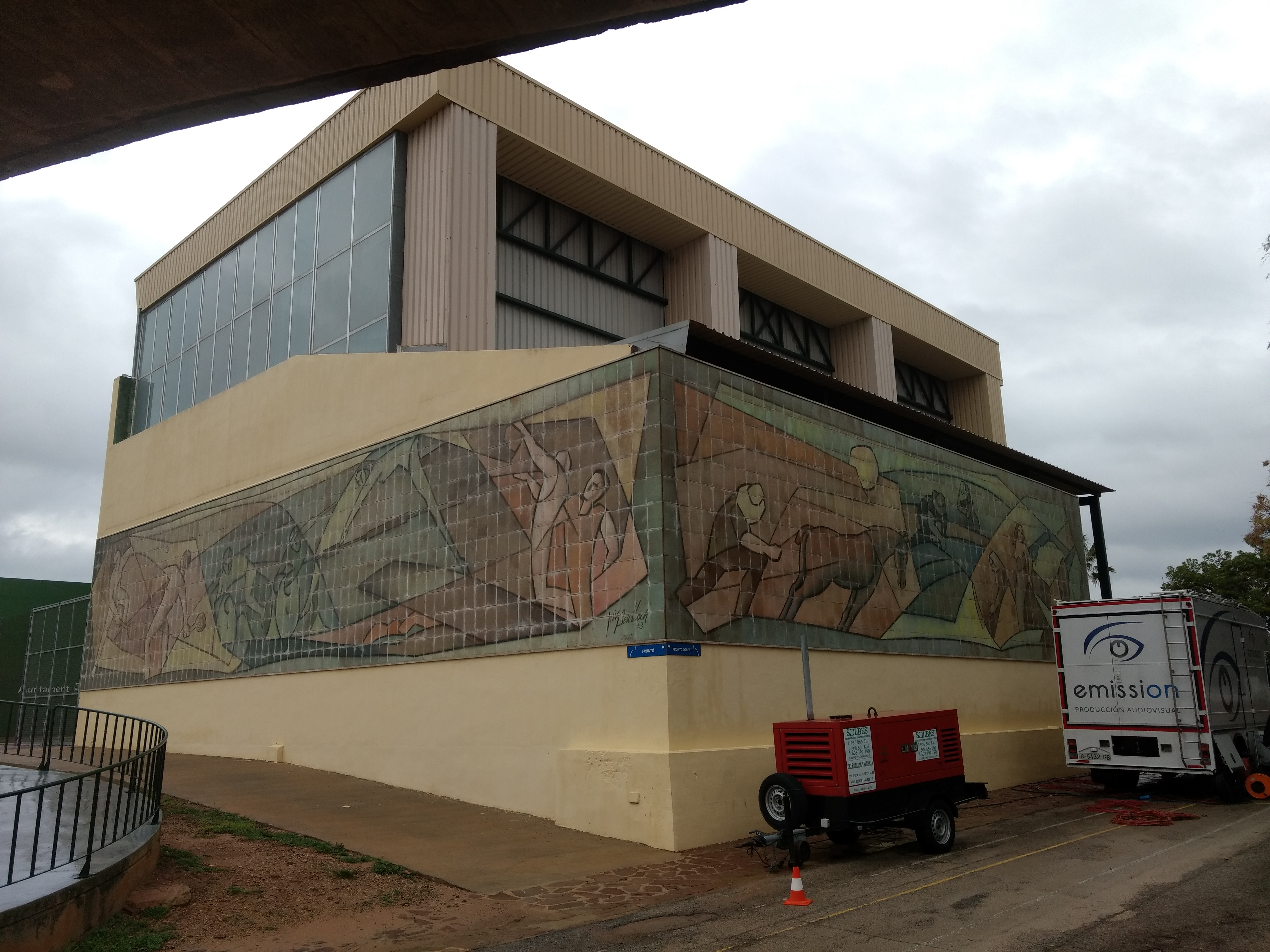 Frontó d'Almussafes